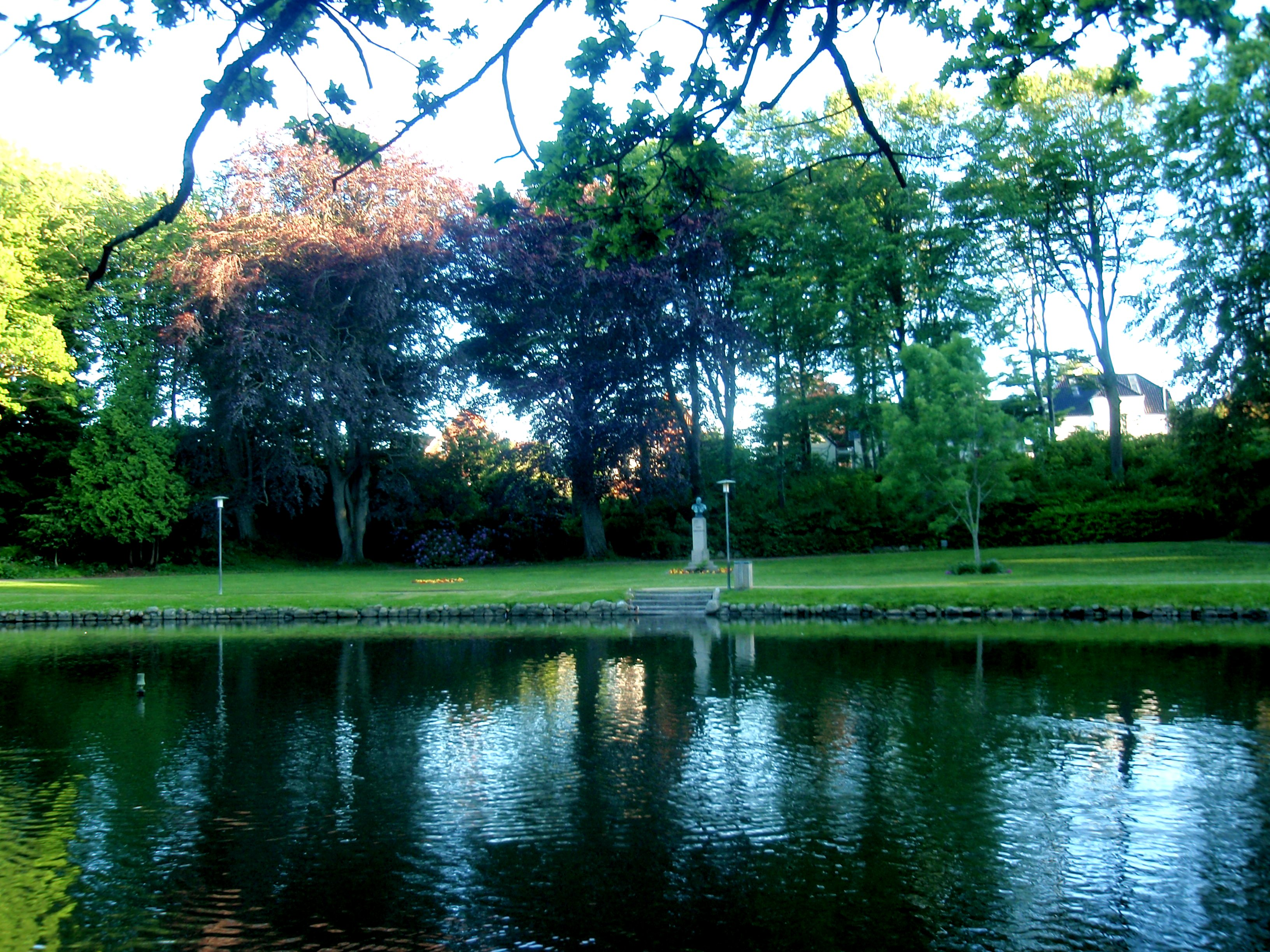 Svanelunden, Hjørring